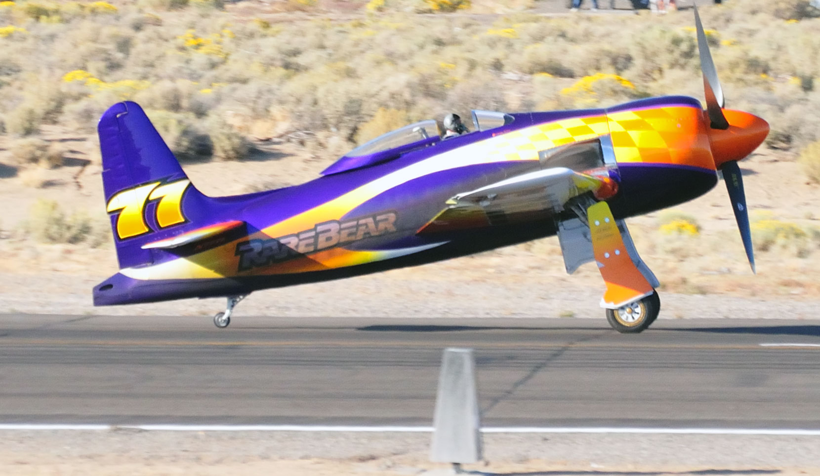 Reno Air Races 2009